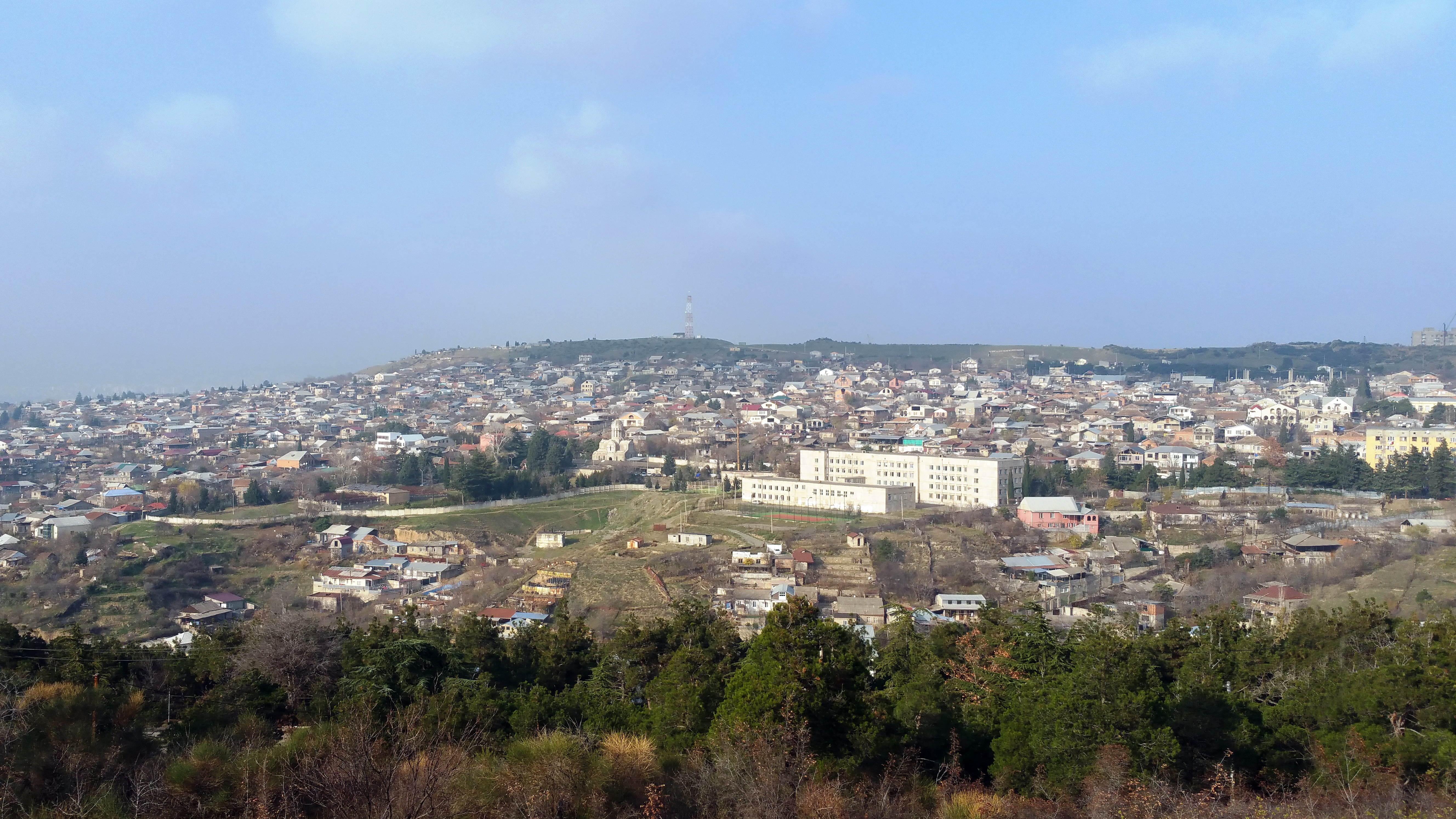 ლოტკინის დასახლება, თბილისი